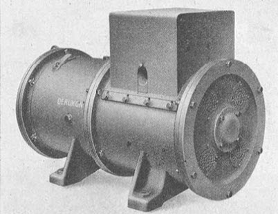 Umformergruppe für die Steuerstromerzeugung einer SBB Ce 6/8 II (Krokodil-Lokomotive). Sie wurde mit 220 V Wechselstrom von einer Wicklung des Haupttransformators betrieben und erzeugte Steuerstrom für die Hilfsapparate. Spannung vermutlich 36 V. Leistung 1,5 kW